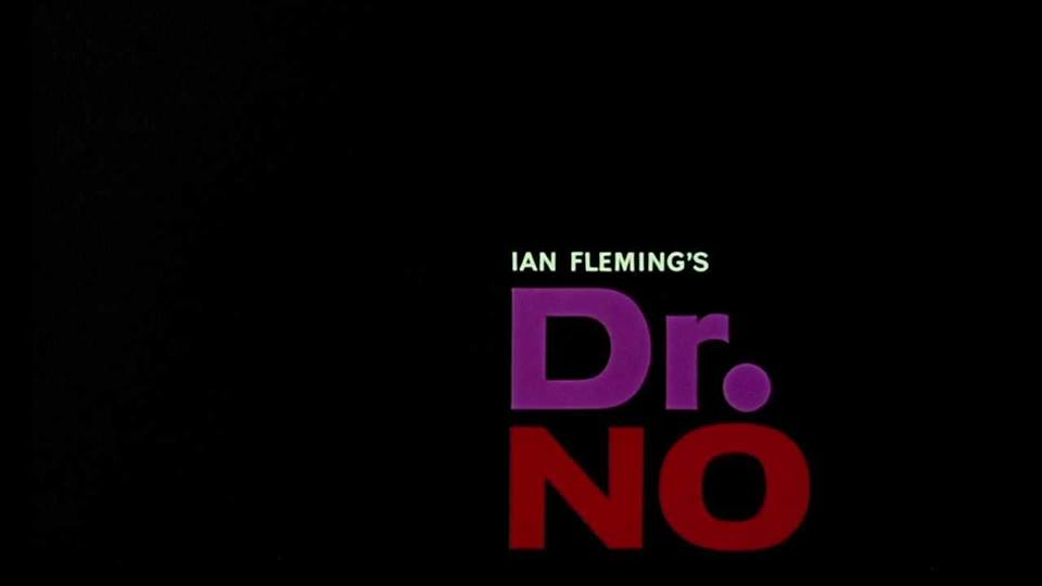 Заставка британского шпионского фильма 1962 года «Доктор Ноу».